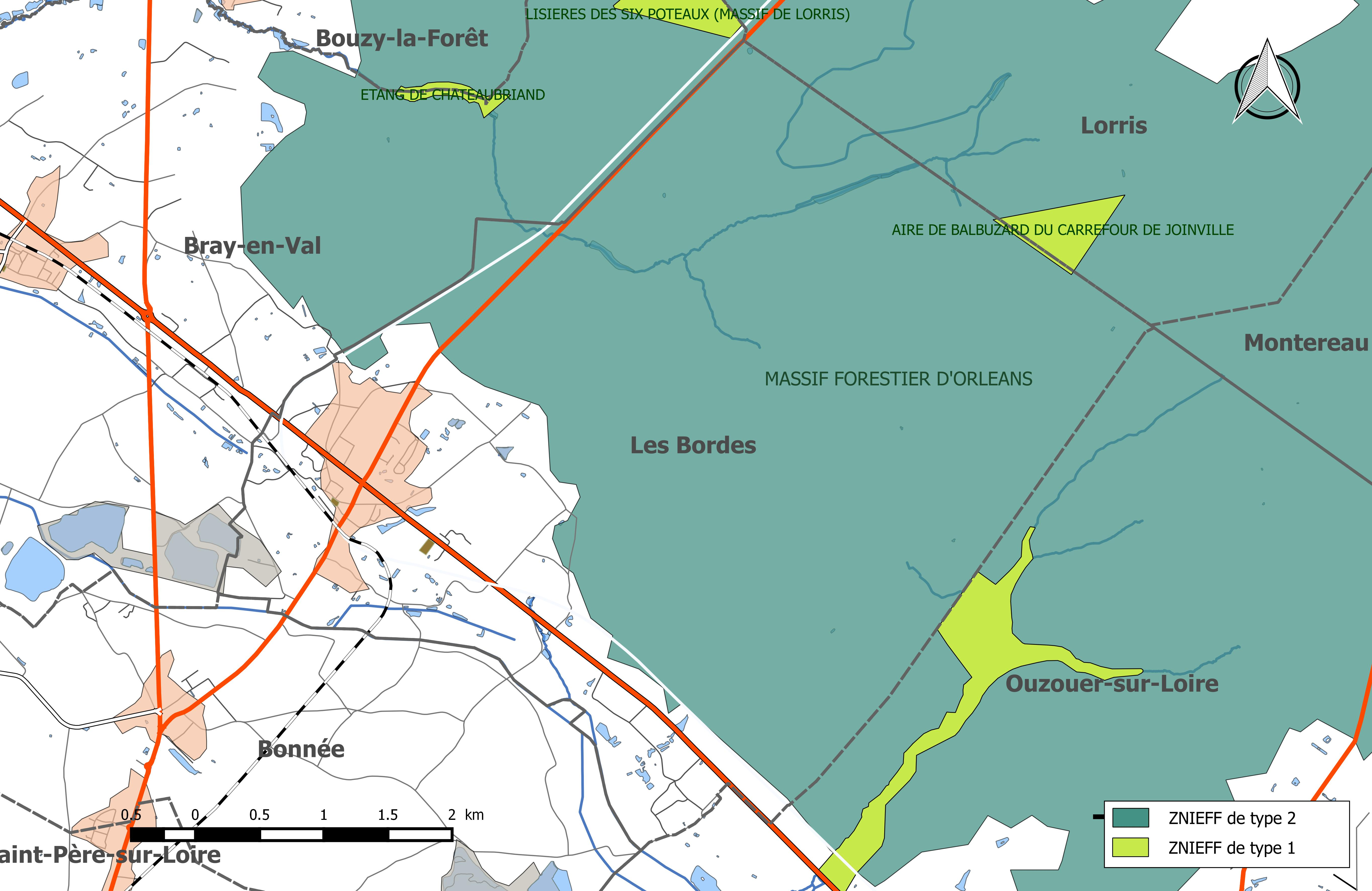 Carte des Zones naturelles d'intérêt écologique faunistique et Floristique (ZNIEFF) de la commune de Les Bordes (Loiret).